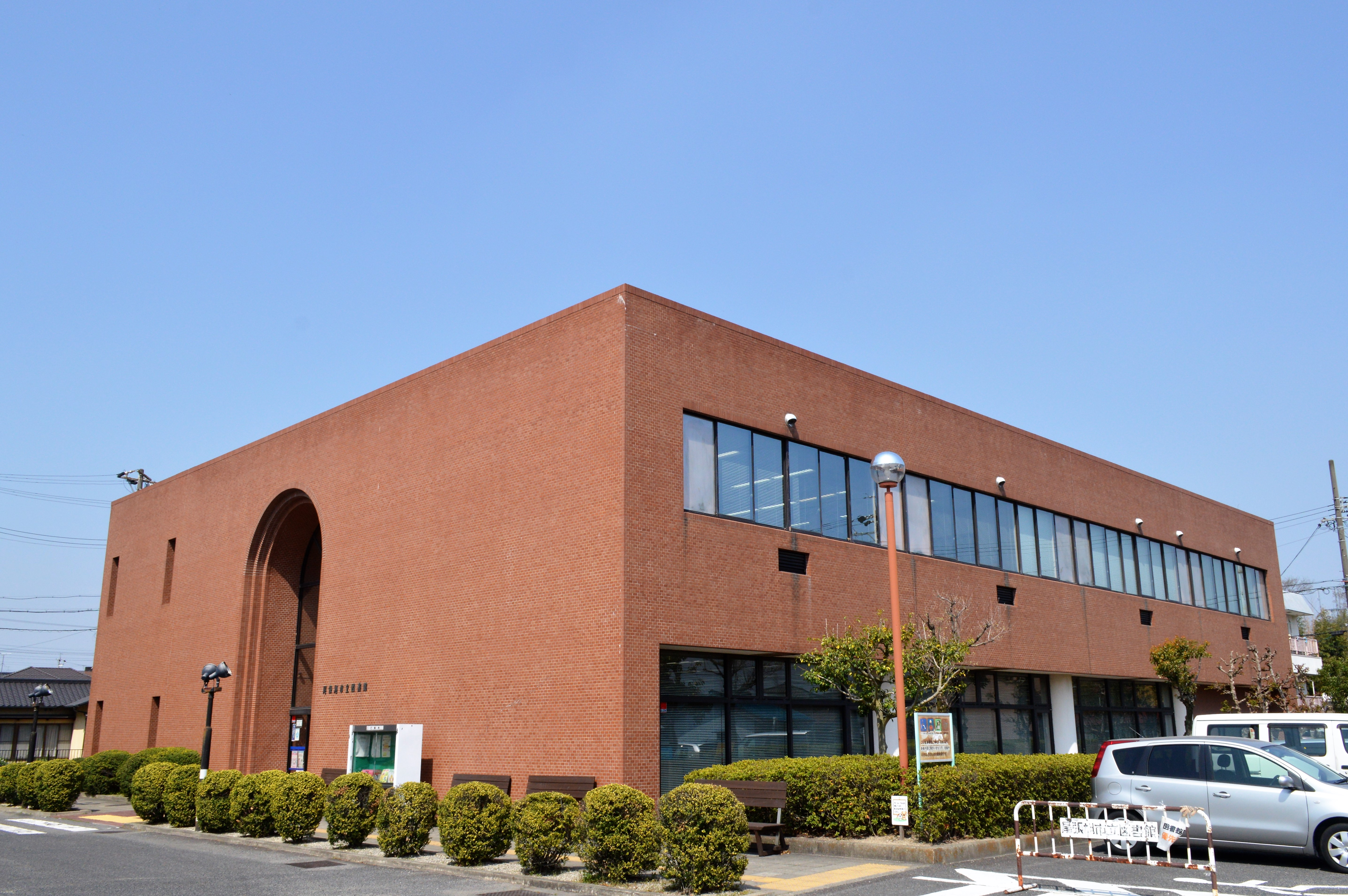 愛知県尾張旭市の尾張旭市立図書館。